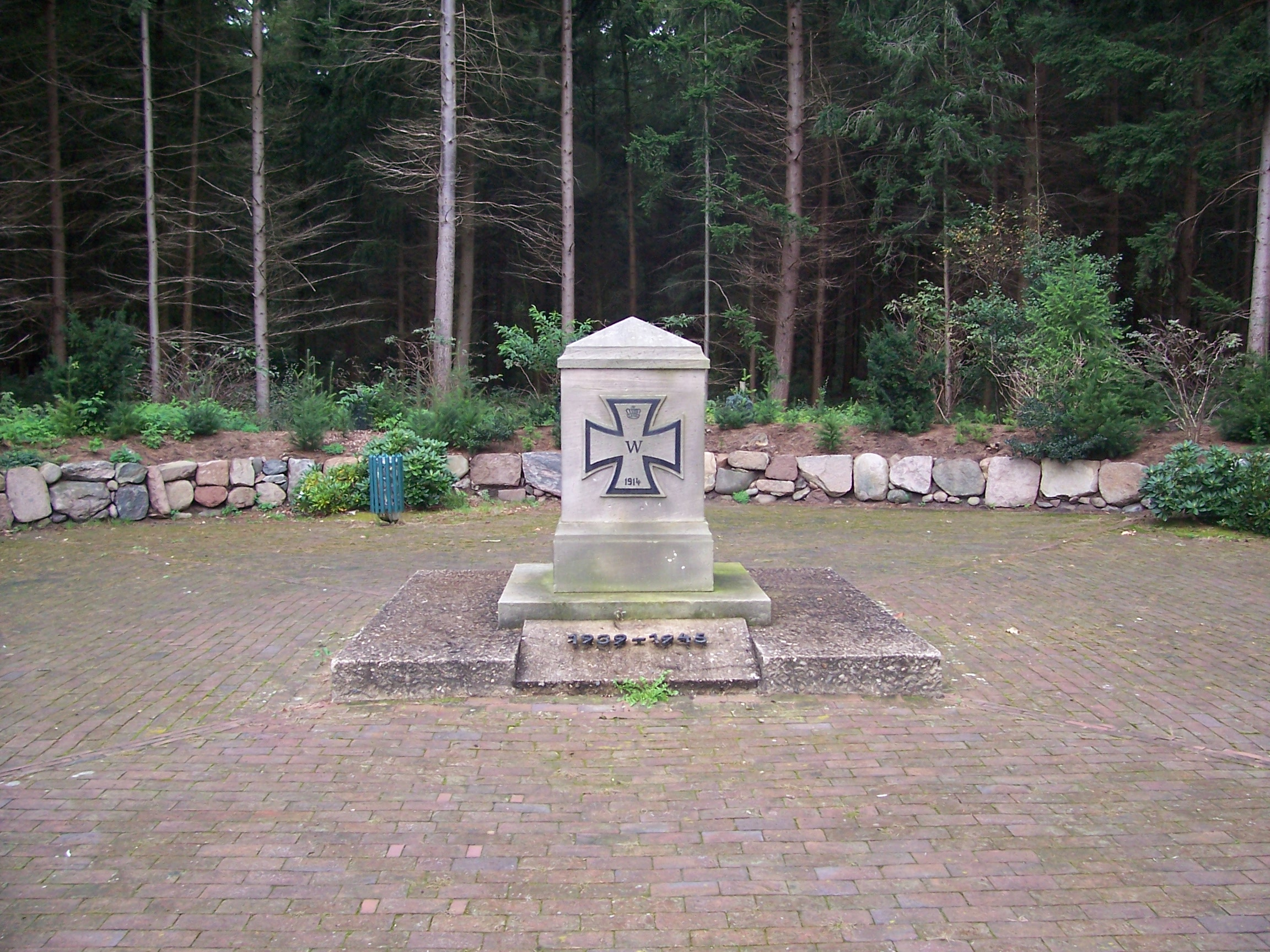 Kriegerdenkmal in Klint